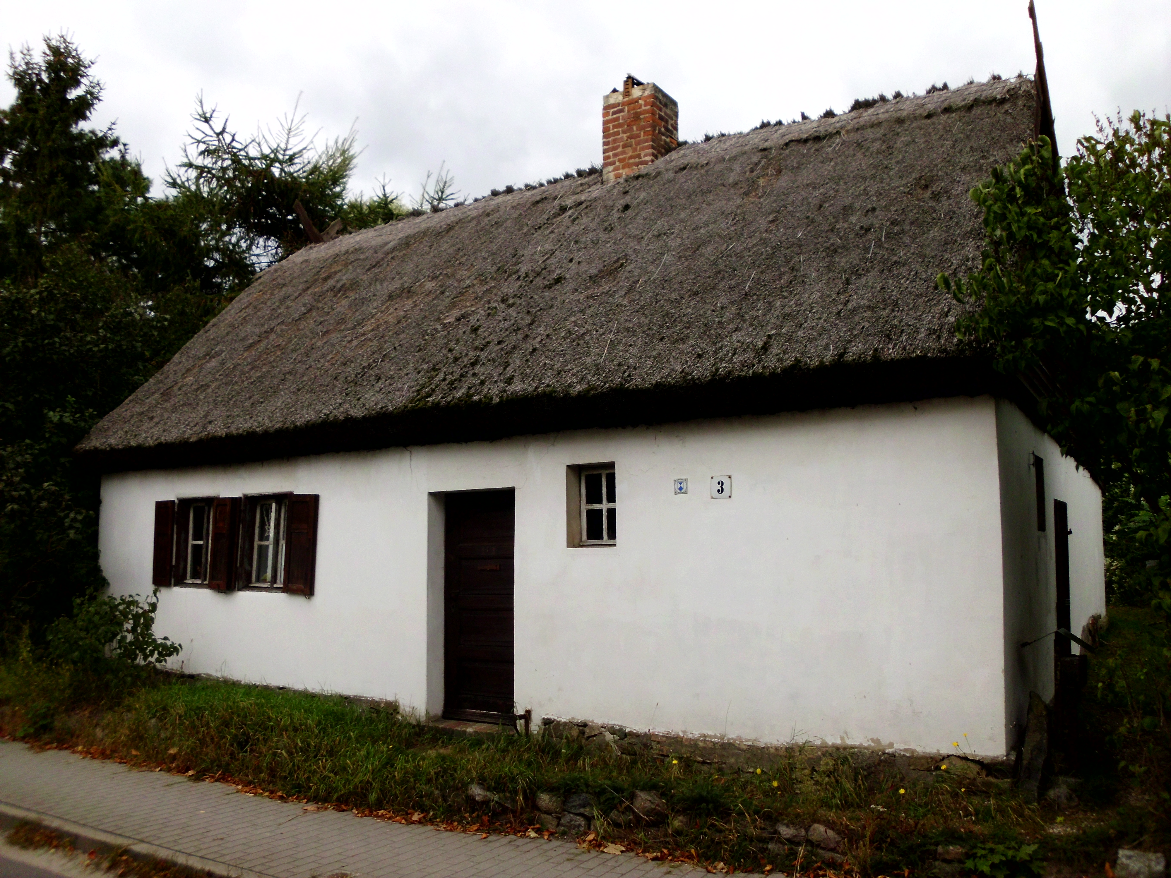 An der Wublitz 2, Leest (OT von Werder (Havel). Vor 2010 war die Adresse Potsdamer Straße 3, dahe die Hausnummer 3 am Haus.)